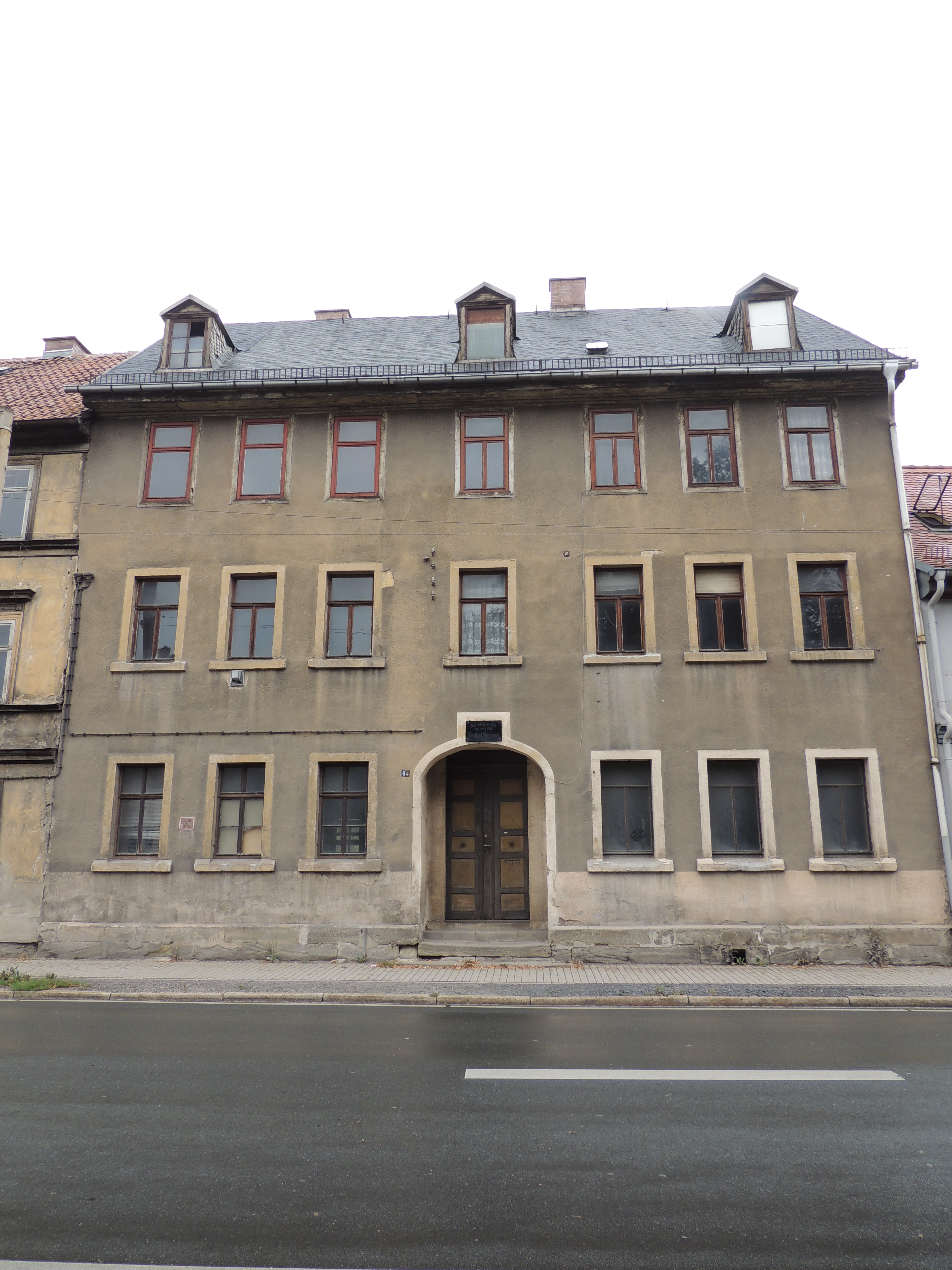 Denkmalgeschütztes Wohnhaus in der Anton-Sommer-Straße 45 in Rudolstadt; Wohn- und Sterbehaus von Berthold Sigismund